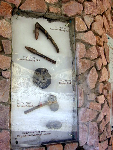 pickaxe קרדומי כרייה מהתקופה המצרית, ואיזמלי כרייה מהתקופה הכלקליותית